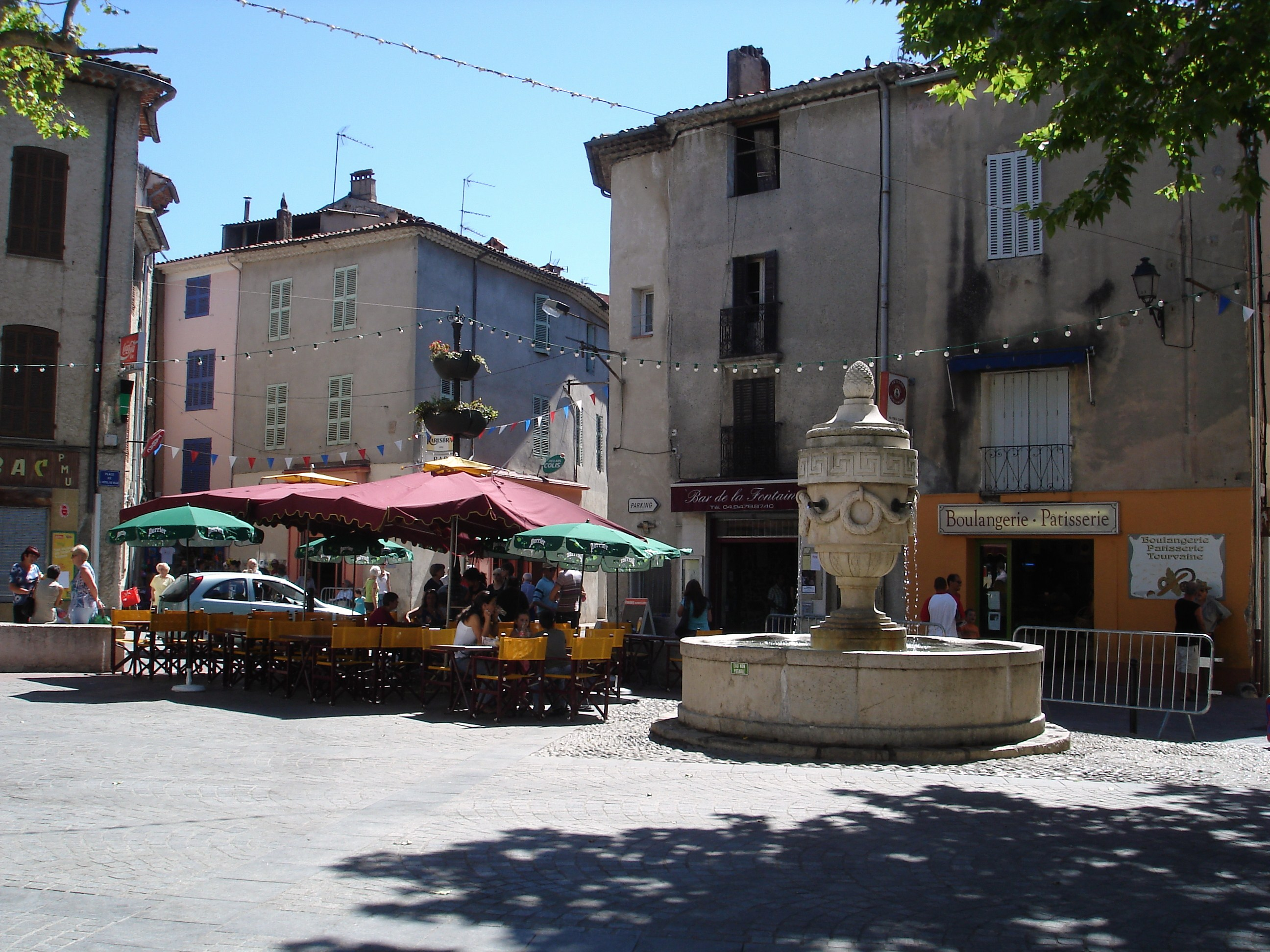 Place de la Mairie à Tourves, département du Var (France)